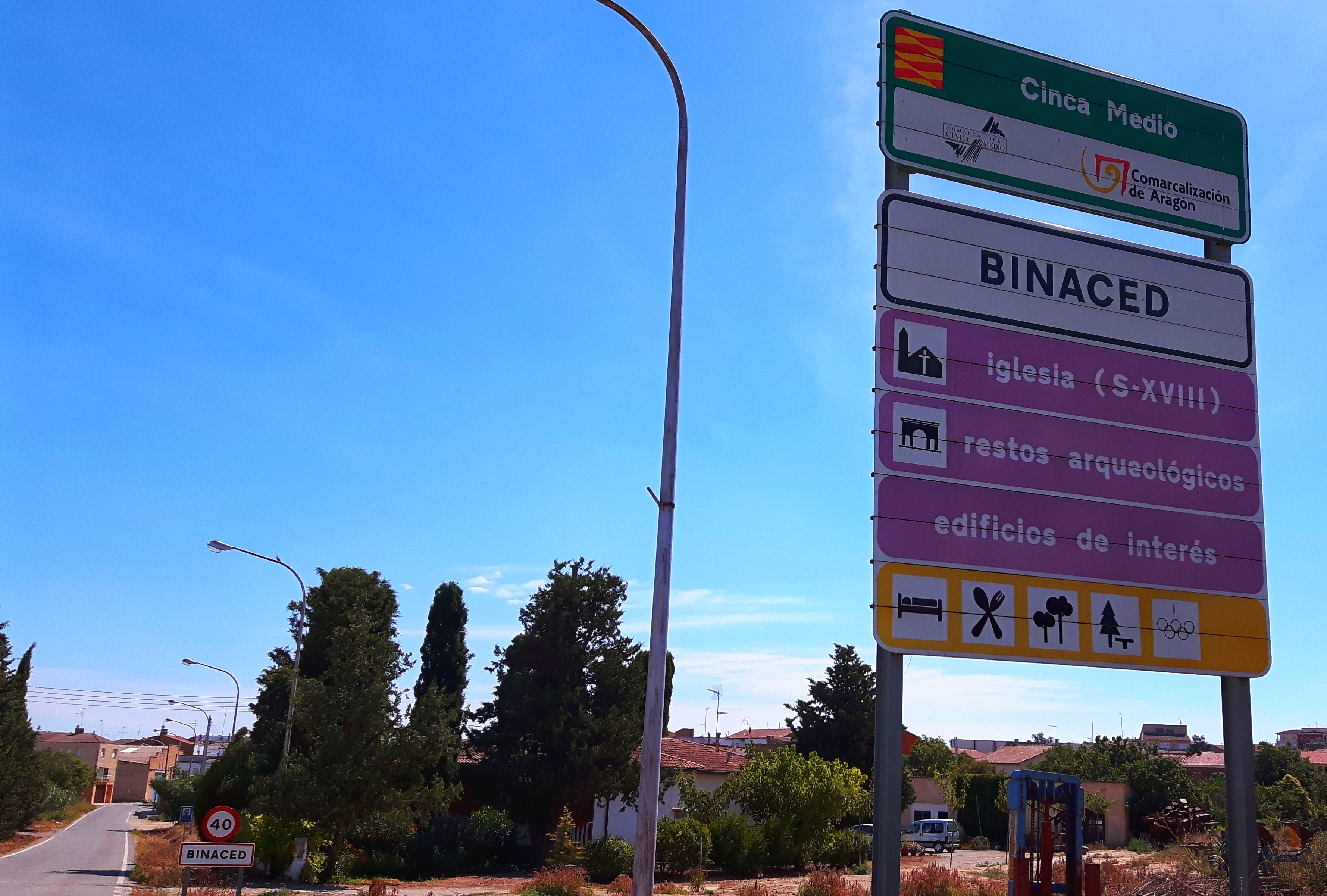 Binaced